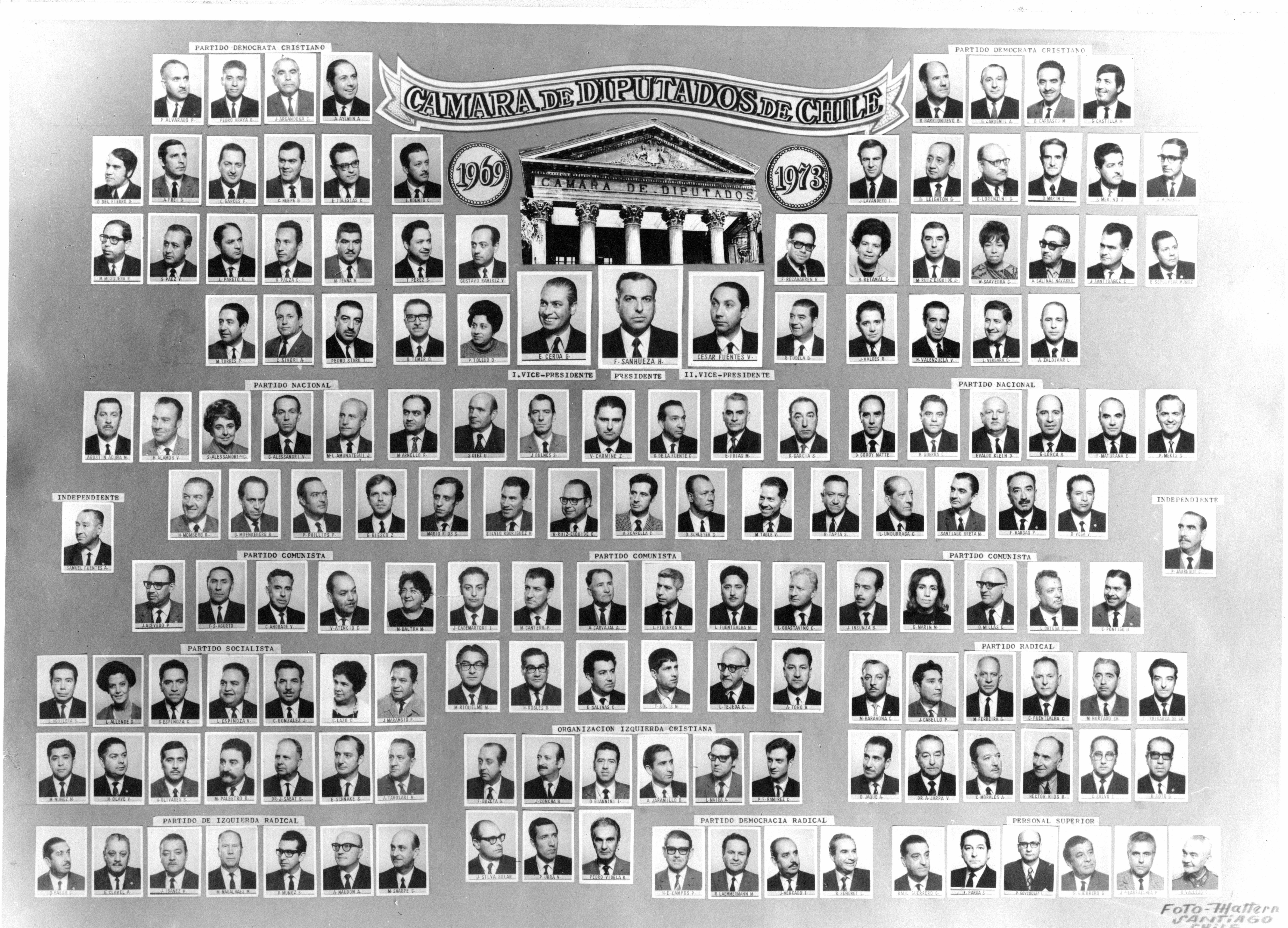 Fotografía oficial de parlamentarios de la Cámara de Diputados. Periodo del 1969 al 1973.